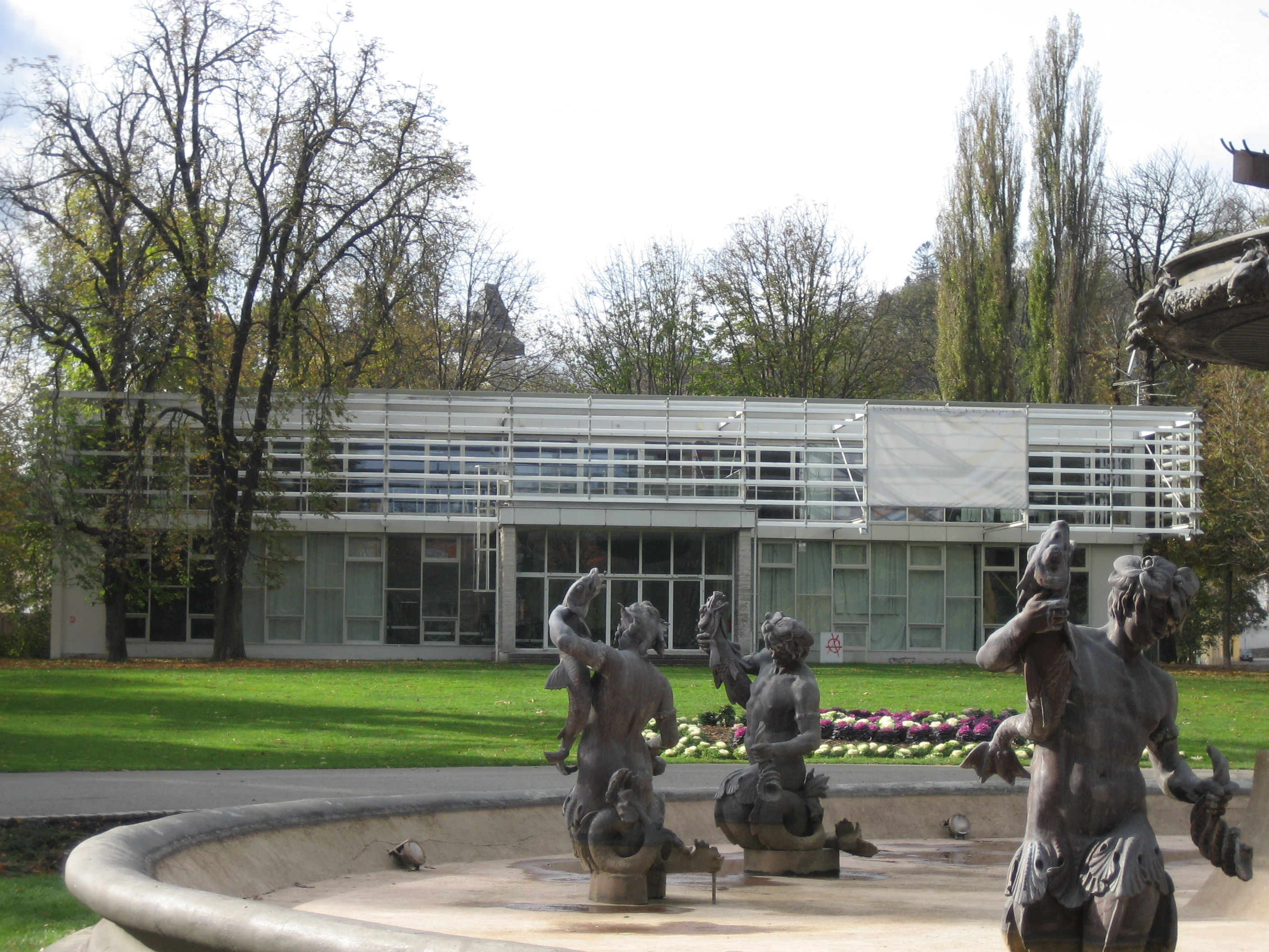 Forum Stadtpark in Graz (Austria)